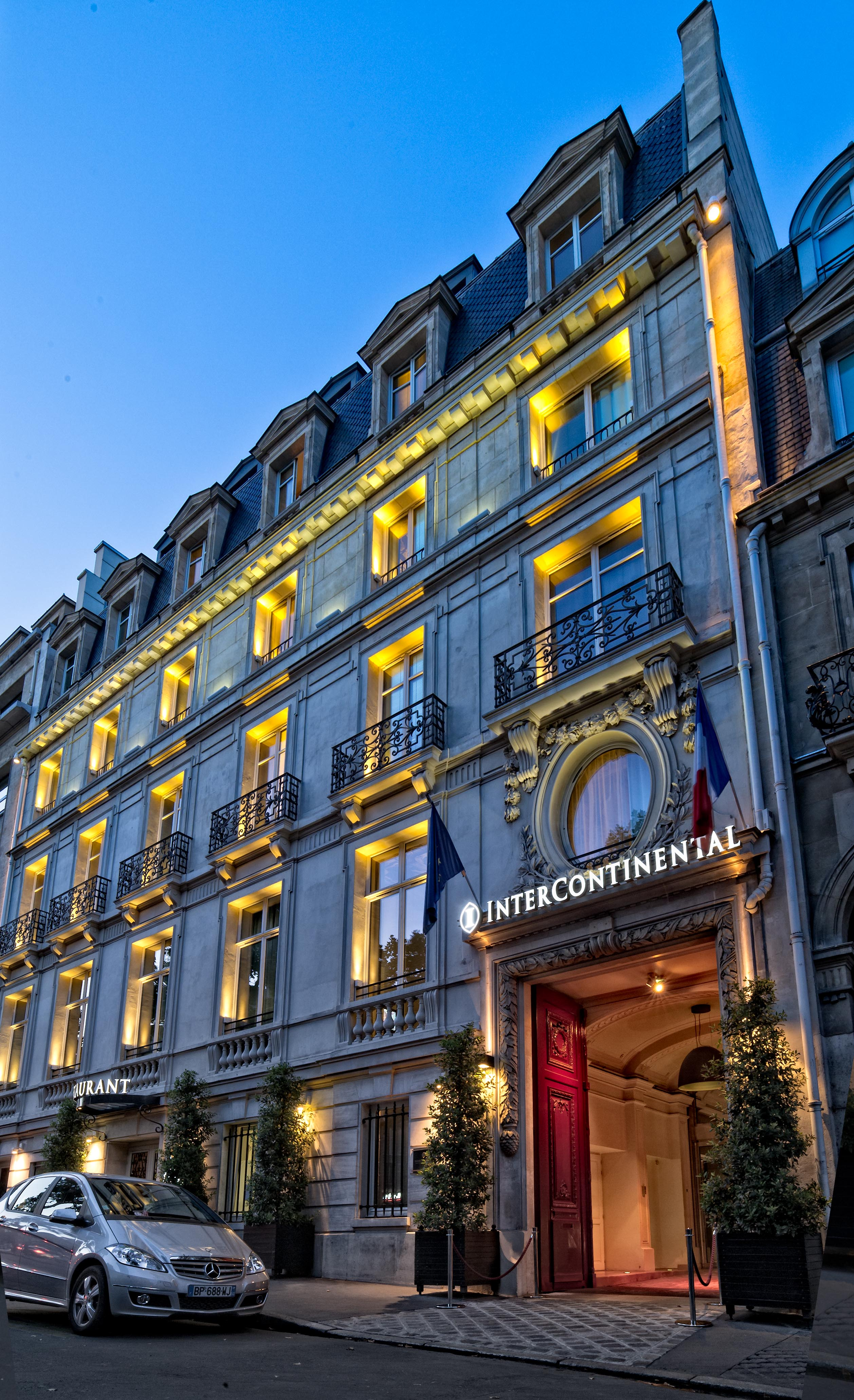 Façade de l'Hôtel Intercontinental située au 64 avenue Marceau